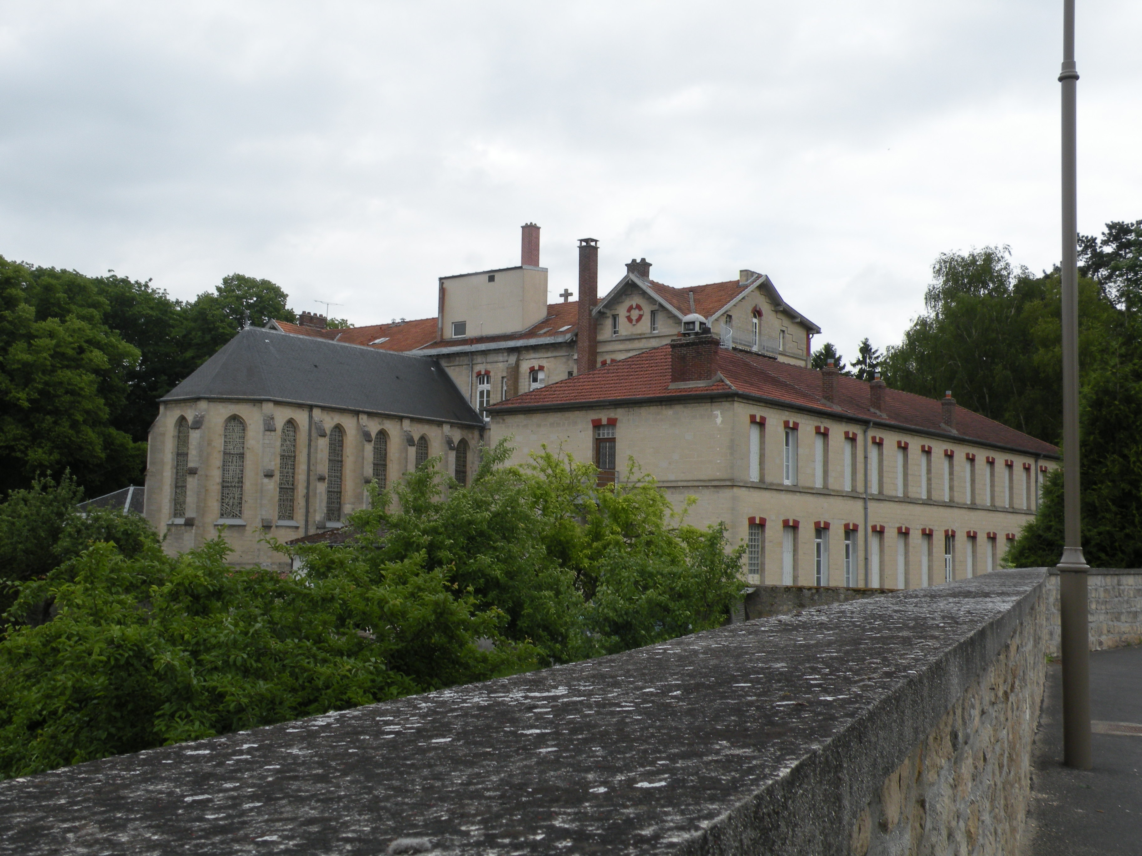 congrégation des Pères Missionnaires Africains les "Pères Blancs" avec un parc de 8 hectares